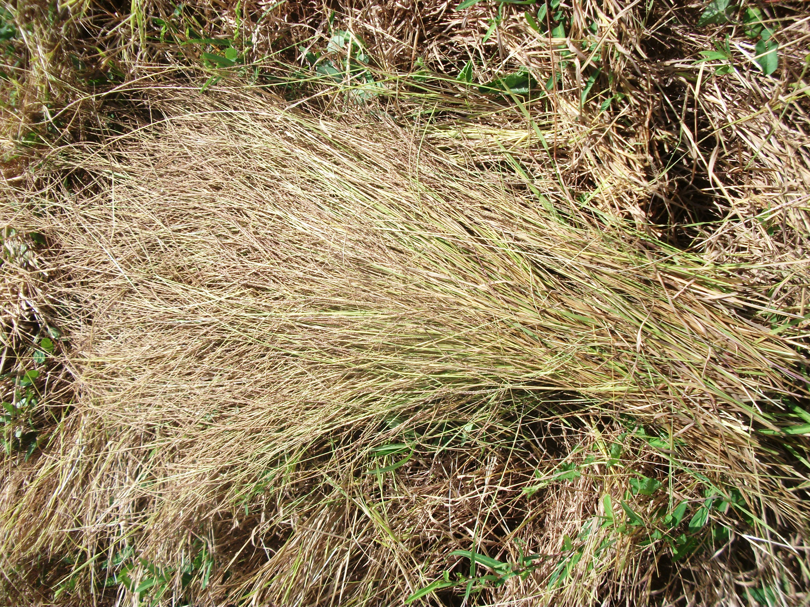 fonio moissonné et entassé au champ